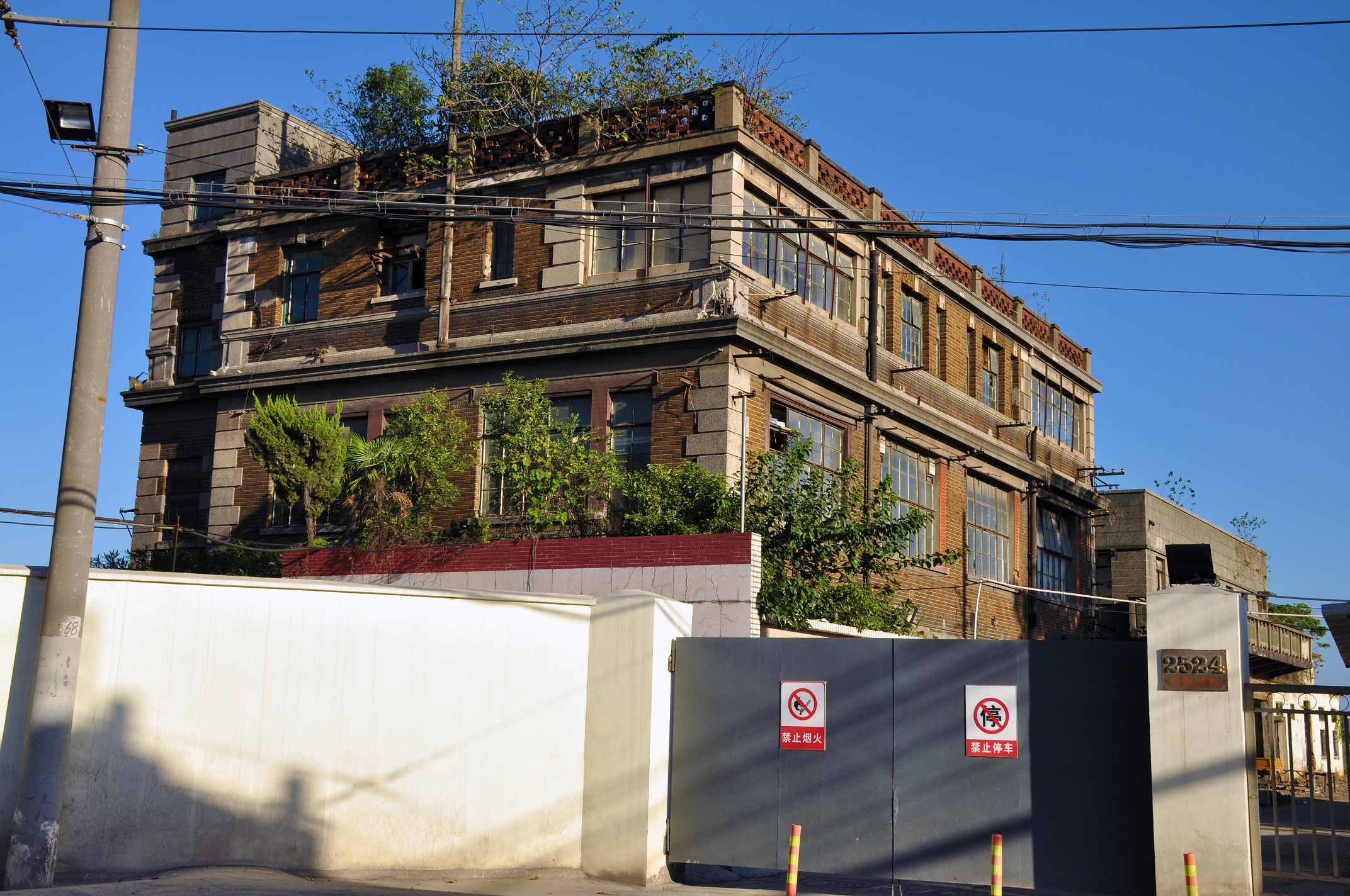 上海煤气公司杨树浦工场旧址 上海市杨树浦煤气厂高级职员住宅 杨树浦路2524号